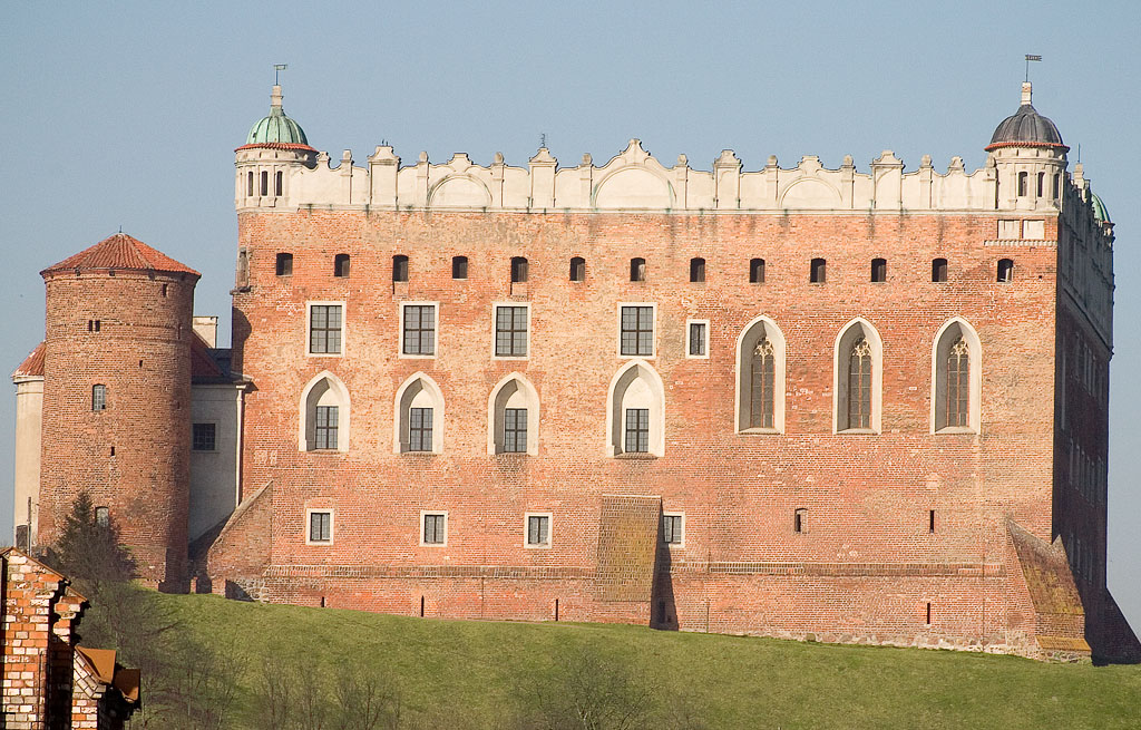 Golub-Dobrzyń castle. Author: Adam Kumiszcza